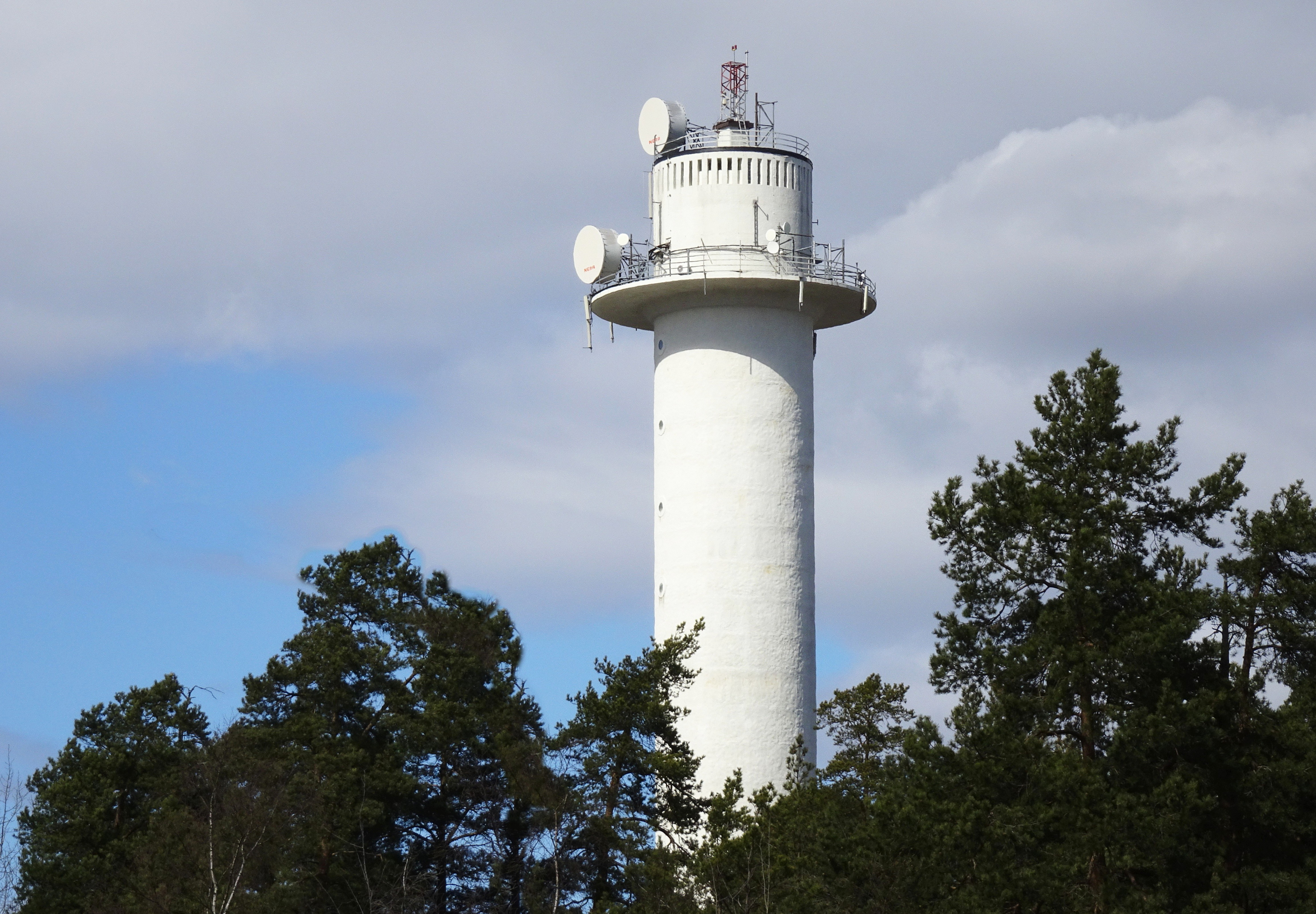 Sätra radiolänktorn mellan Sätra och Bredäng, arkitekt Jan Wallinder (1960)